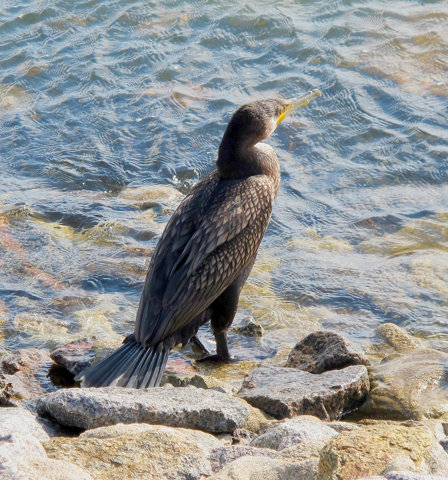 Kormoran im Jugendkleid auf der Insel Föhr